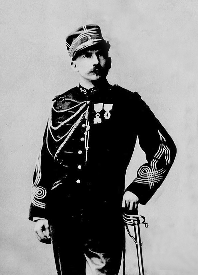 Gustave Binger, Biographies alsaciennes avec portraits en photographie, série 5